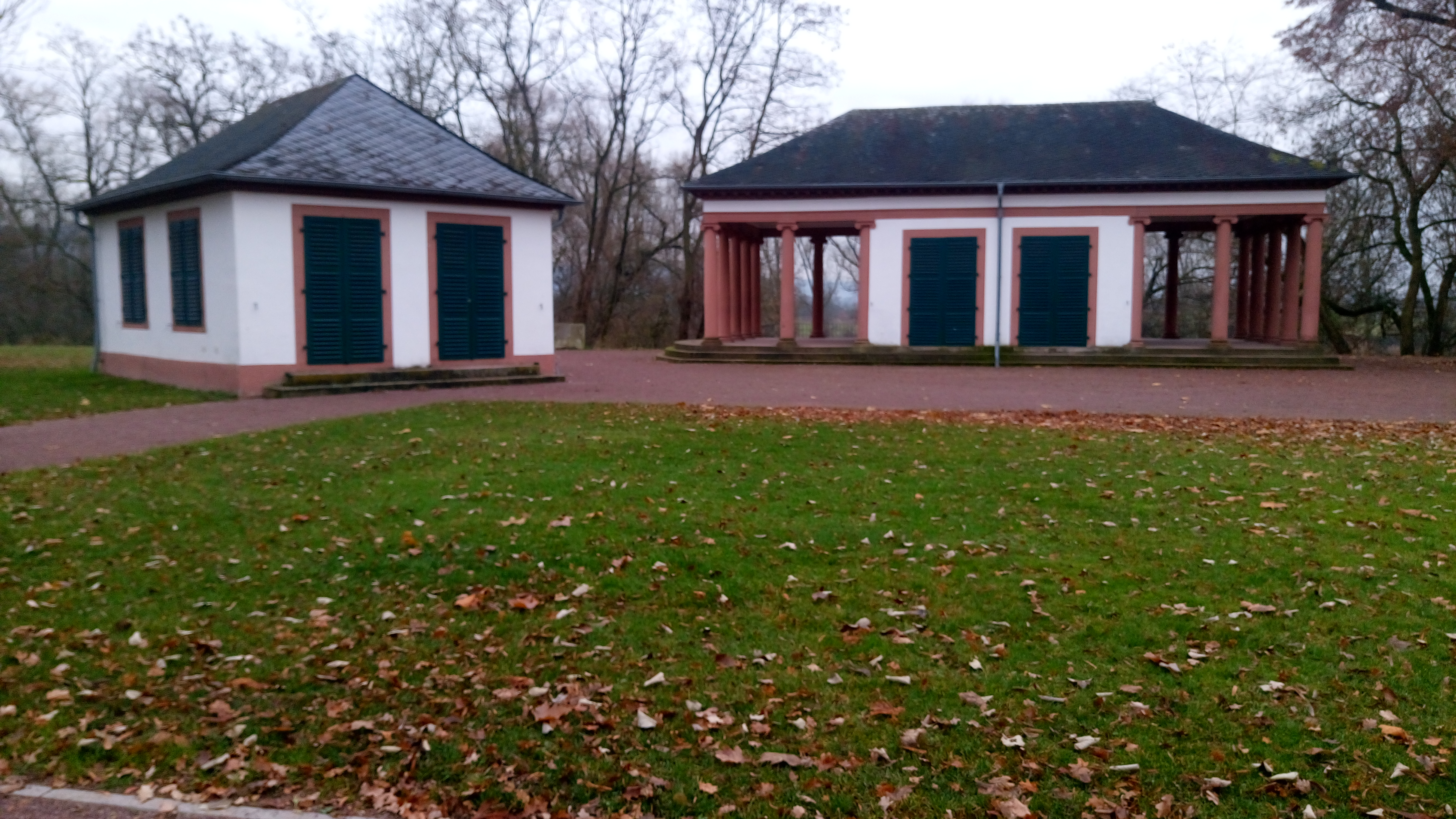 Speisesaal (Billardsaal), links und Spiegelsaal, rechts im Nilkheimer Park in Aschaffenburg